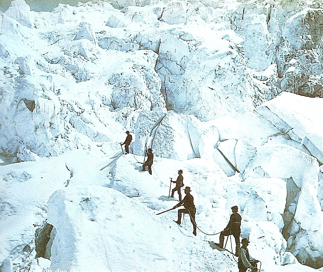 La caravane du Dr. Bardy sur la voie du mont-blanc en 1880.